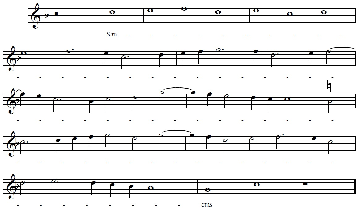 Línia melòdica d'un fragment del Sanctus Dominus Deus Sabaoth de la Missa Beata Virgine de Josquin Des Prez